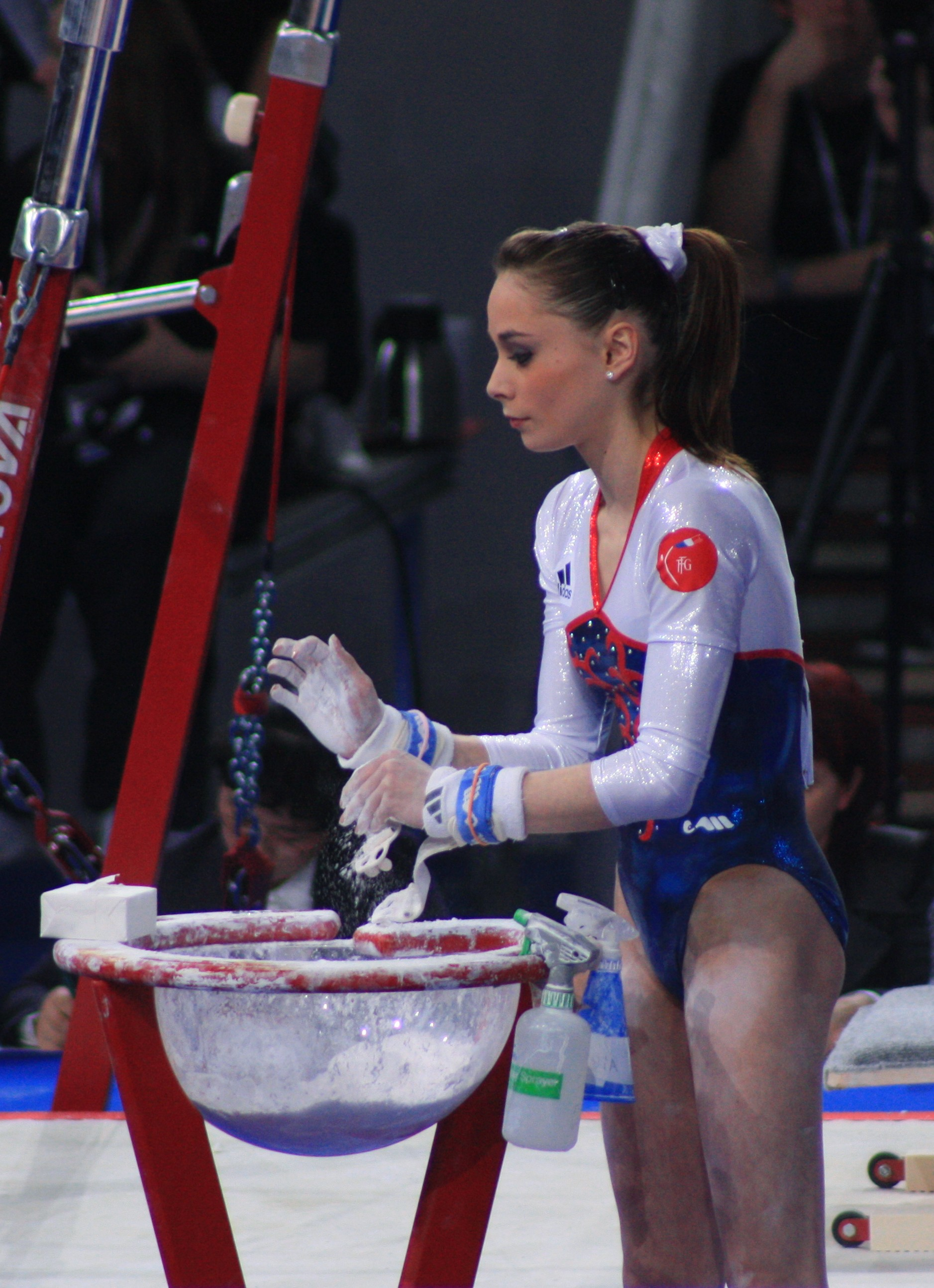 Pauline Morel se préparant avec la magnésie avant son passage en qualifications des barres asymétriques aux 17e Internationaux de France en 2010.